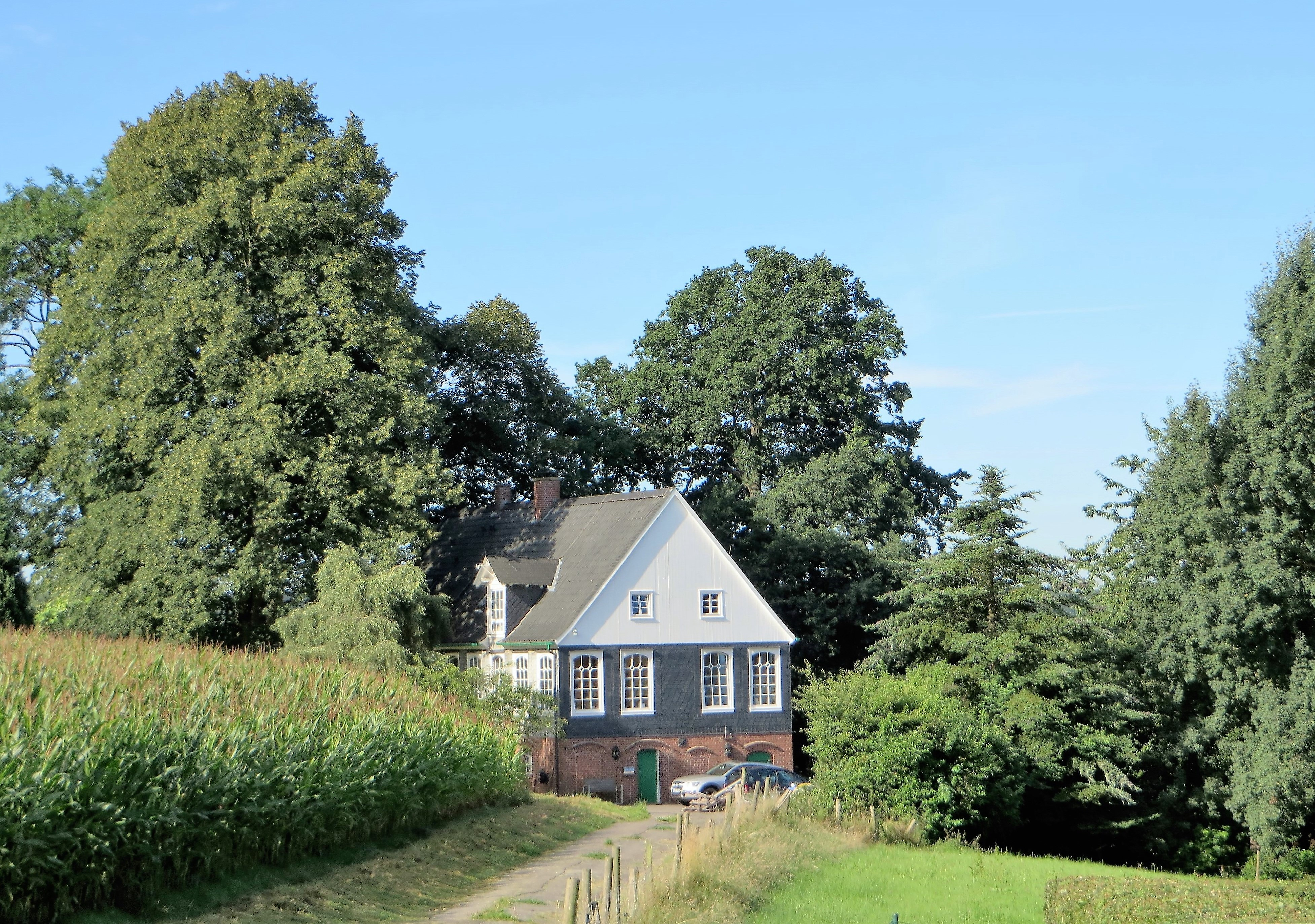 Denkmalgeschütztes Wohnhaus in Sprockhövel-Gennebreck, Barmer Straße 20. Ehemalige Heimbandwirkerei. This is a photograph of an architectural monument.